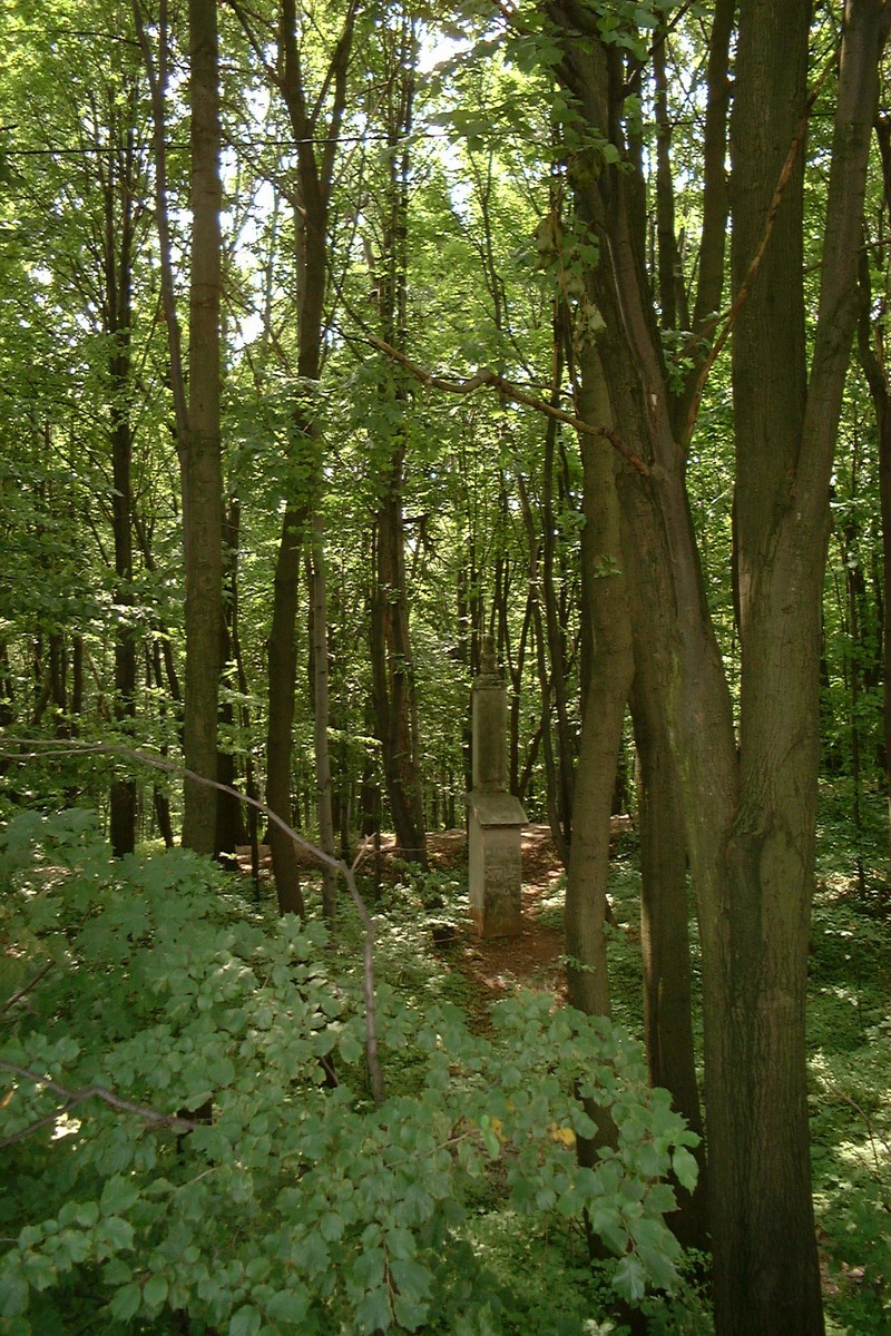 Poland Kielce - Checinsko-Kielecki Landscape Park.